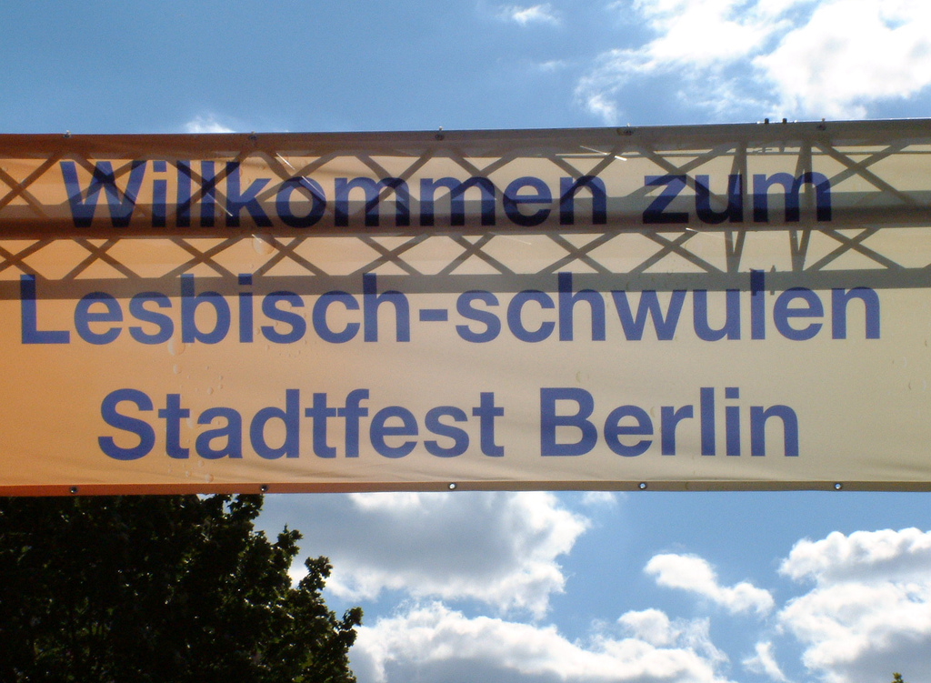 Schwul-lesbisches Stadtfest Berlin